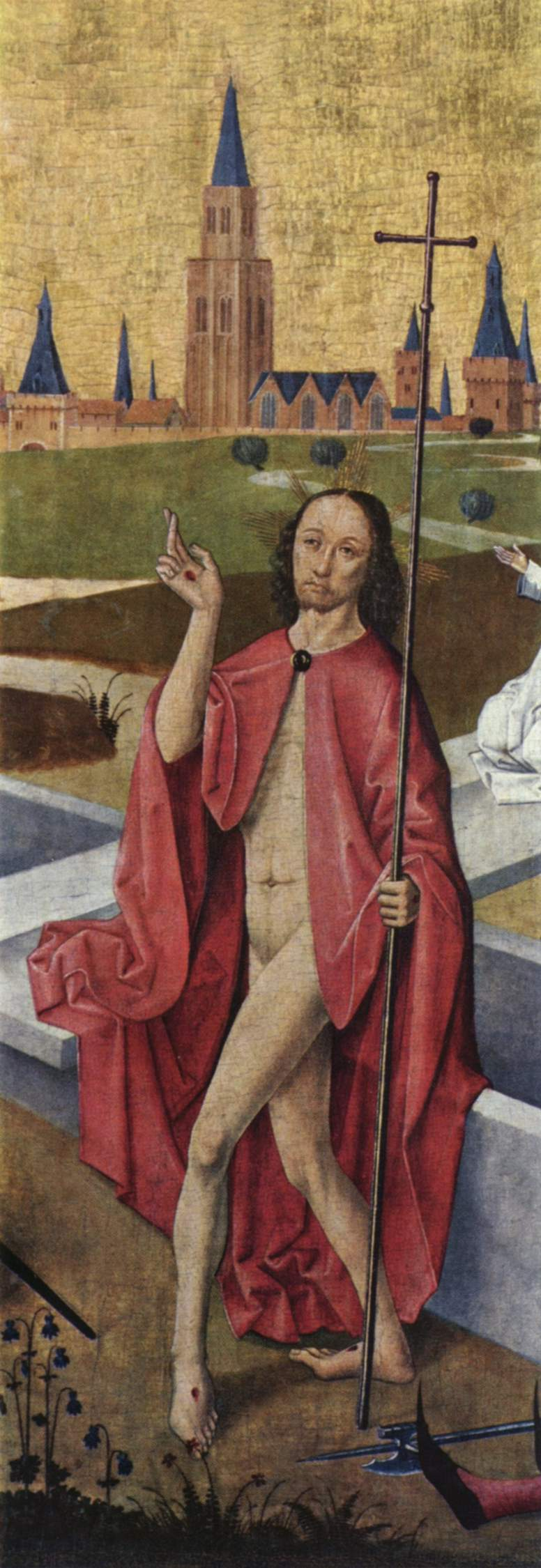 Detail: Christus